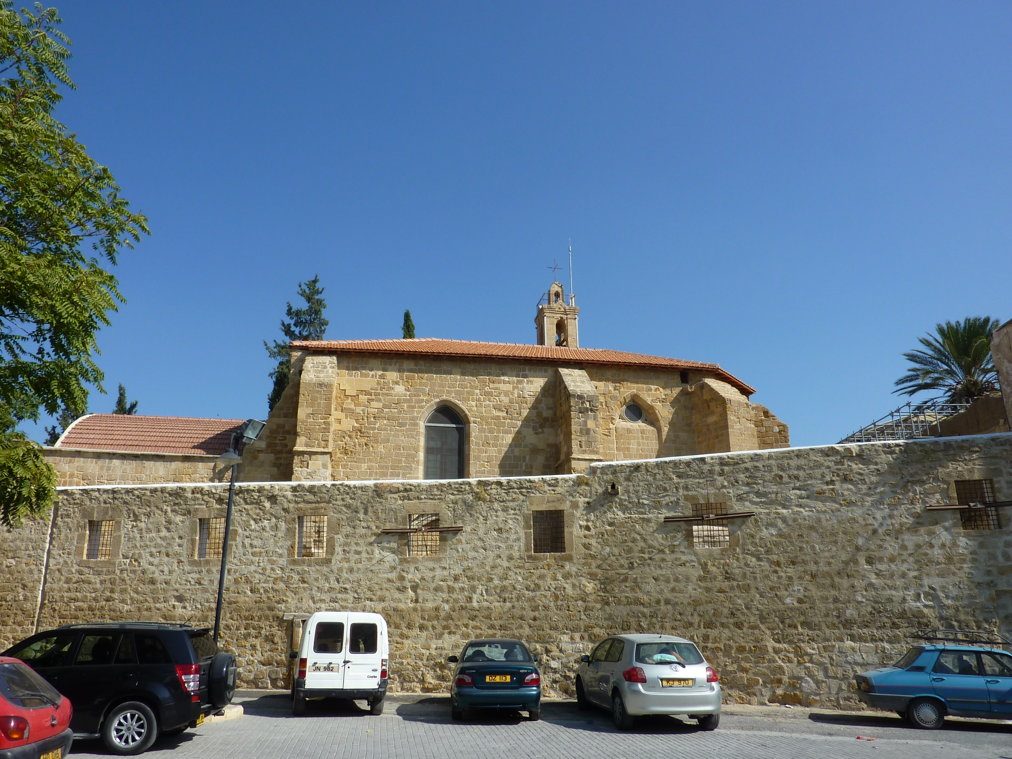 Notre Dame de Tyre, Nicosia